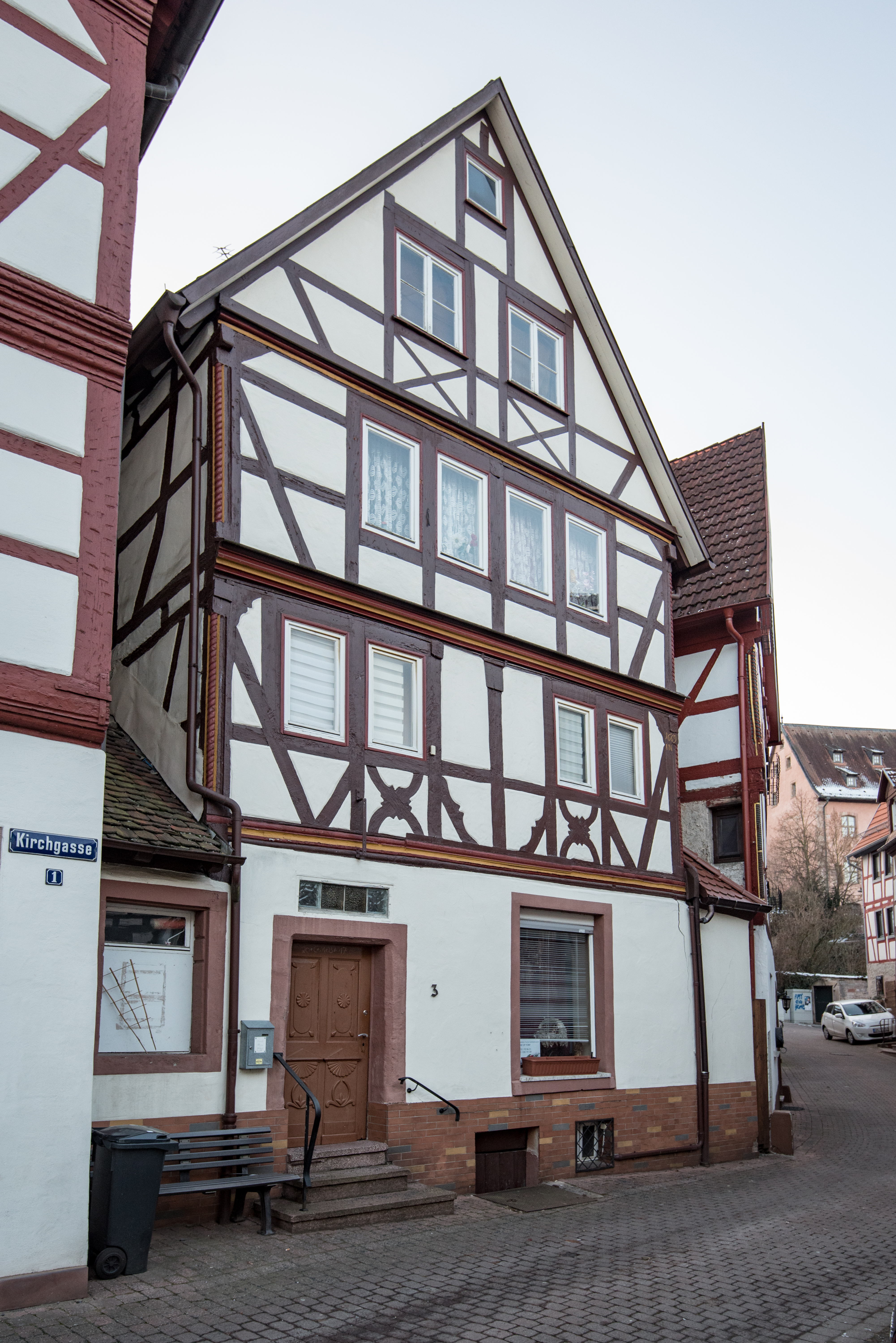 Bad Orb, Kirchgasse 3